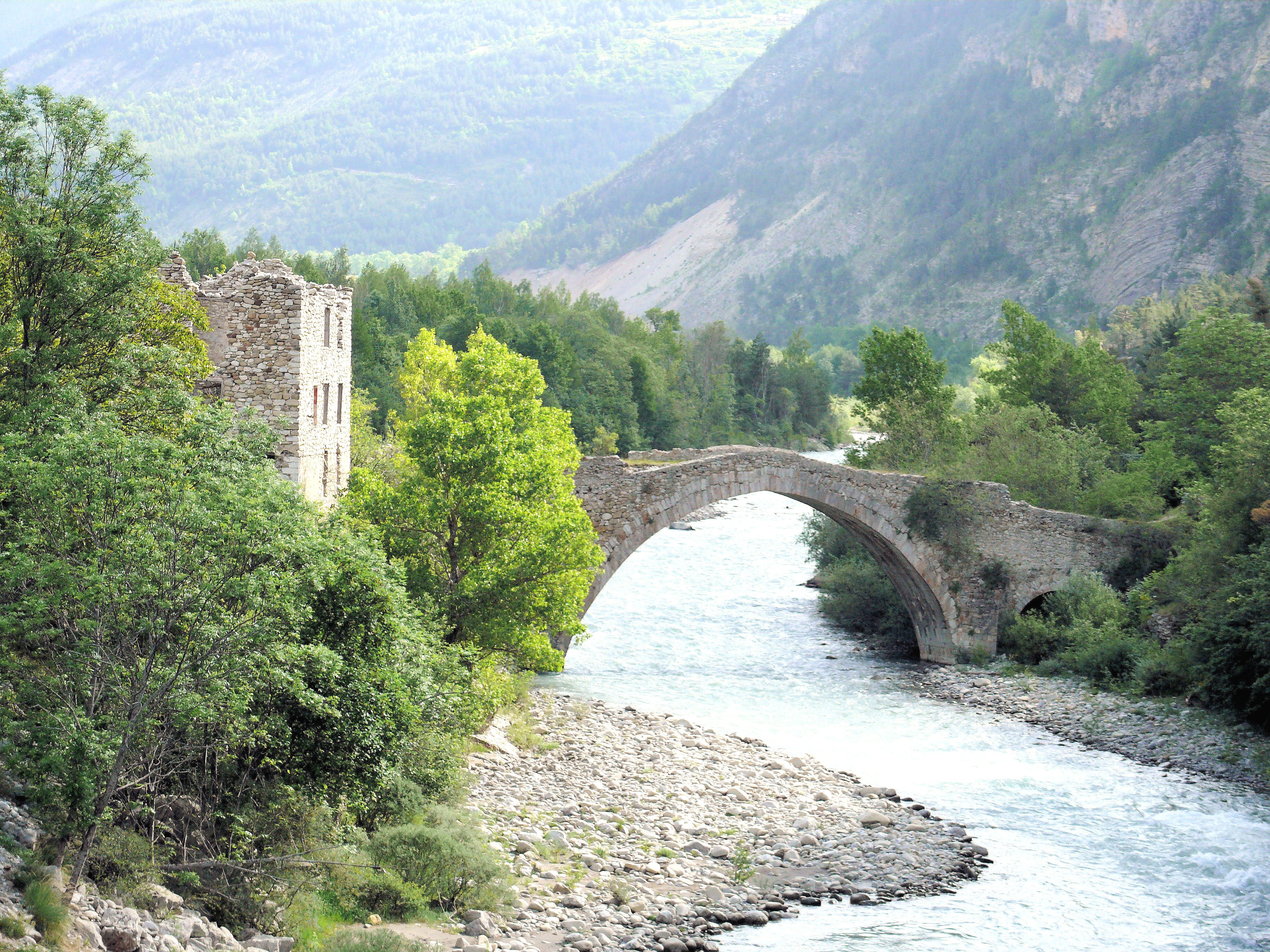 Thorame-Haut - Pont du Moulin sur le Verdon vers Ondres